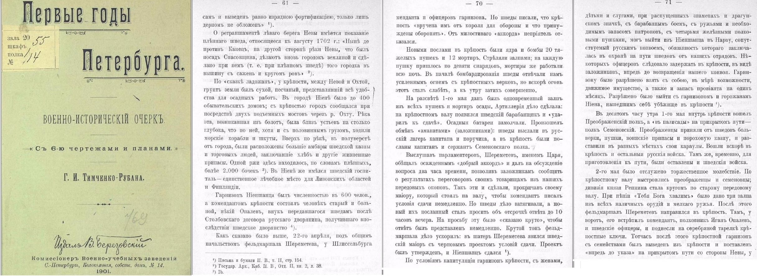 Копия страниц из оригинала книги